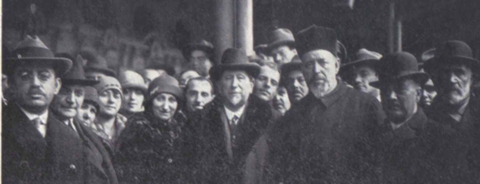 ביקור נחום סוקולוב בפלובדיב, פברואר 1928. סוקולוב במרכז התמונה מימינו בתמונה הרב הראשי ליהודי פלובדיב הרב שמואל בנימין בכר וקיצוני שמאלי בתמונה, יושב ראש ההסתדרות הציונית בבולגיה אלברט רומנו